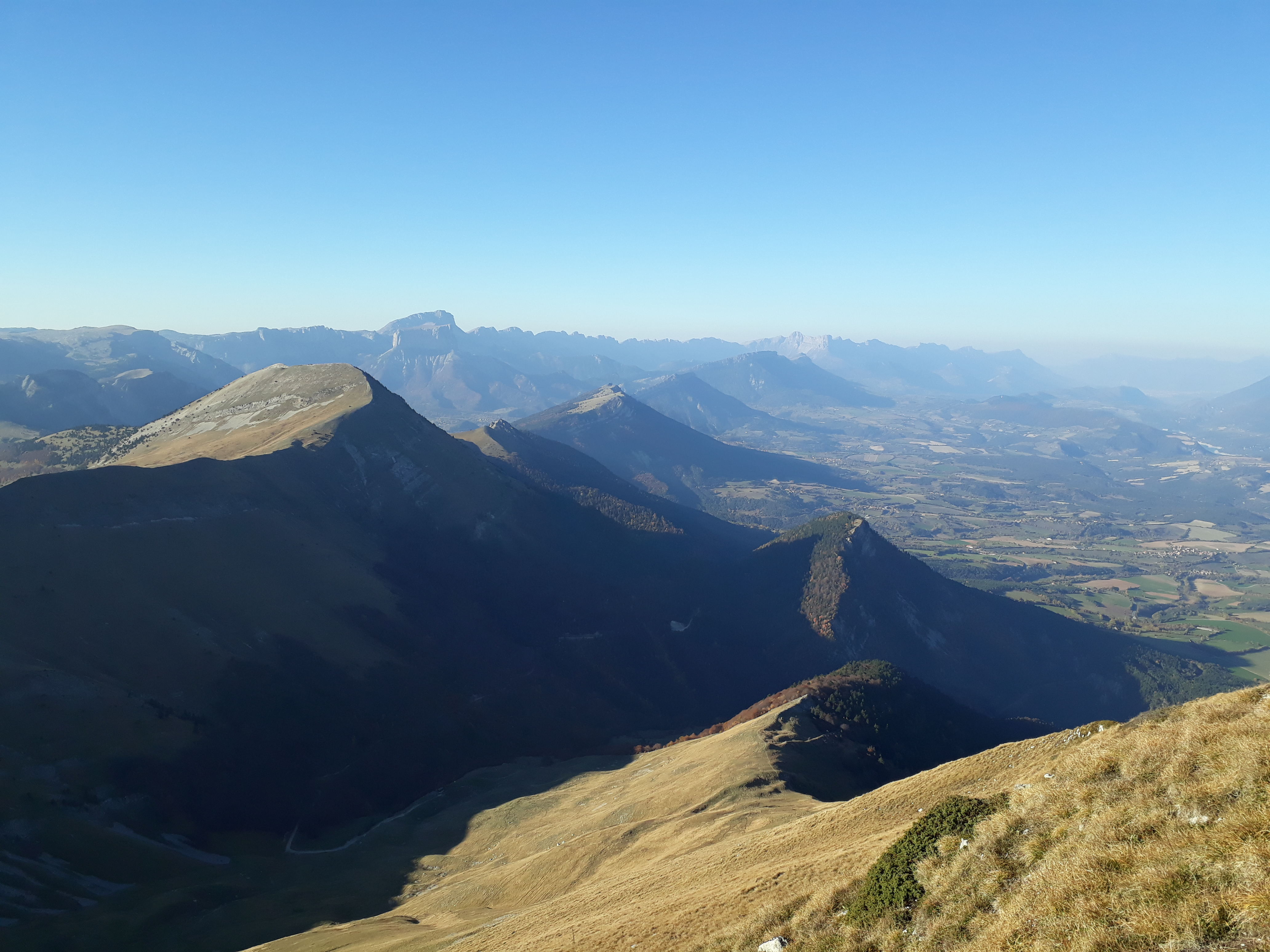 Le Mont Barral, la muraille orientale du Vercors, avec la Mont Aiguille et la partie occidentale du Trièves, vus depuis la crête de Larchat, au sud.